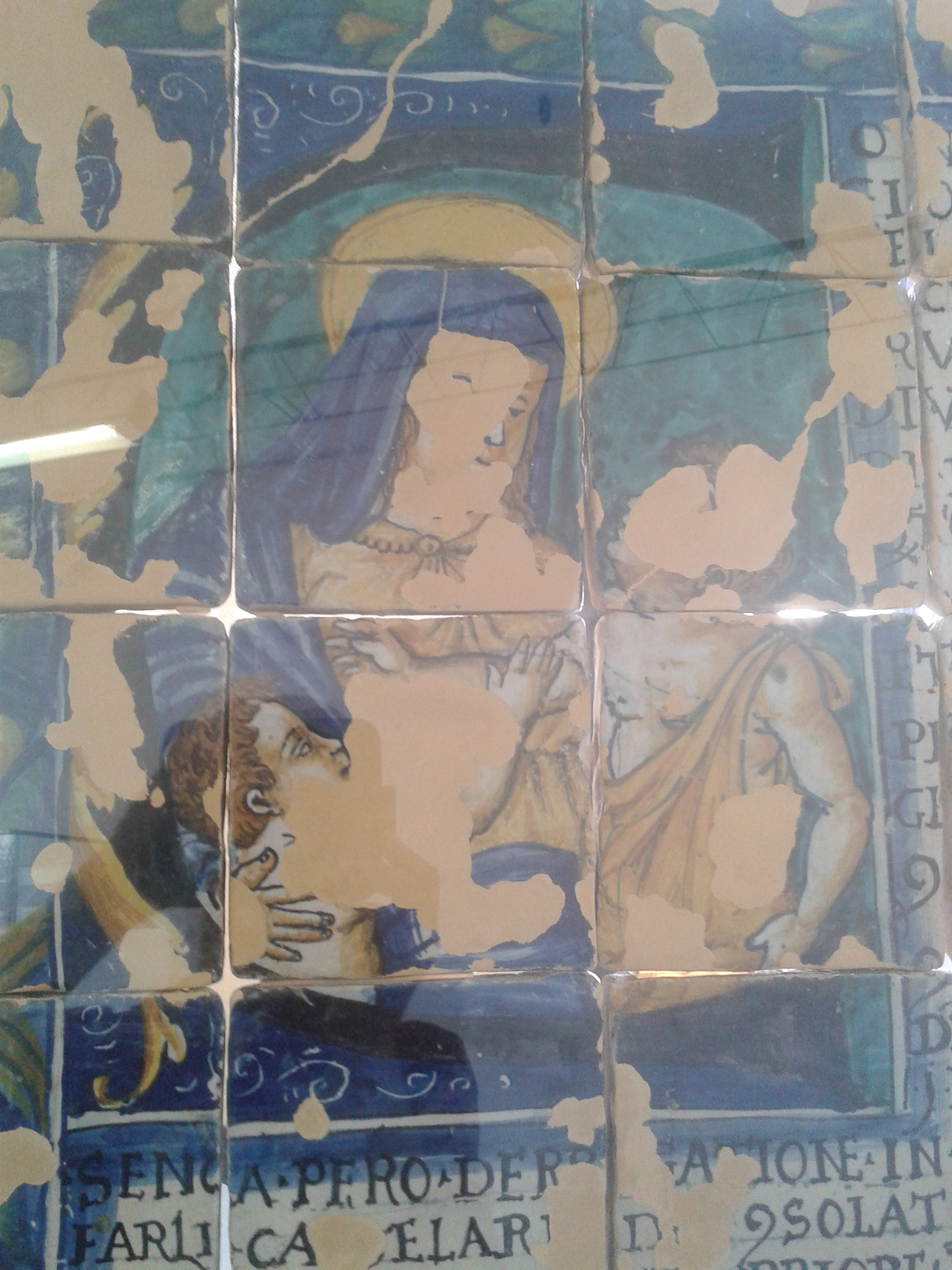 Capitoli dei pacificatori di Sciaccarama conservato al Museo della Ceramica di Albisola Superiore This is a photo of a monument which is part of cultural heritage of Italy.